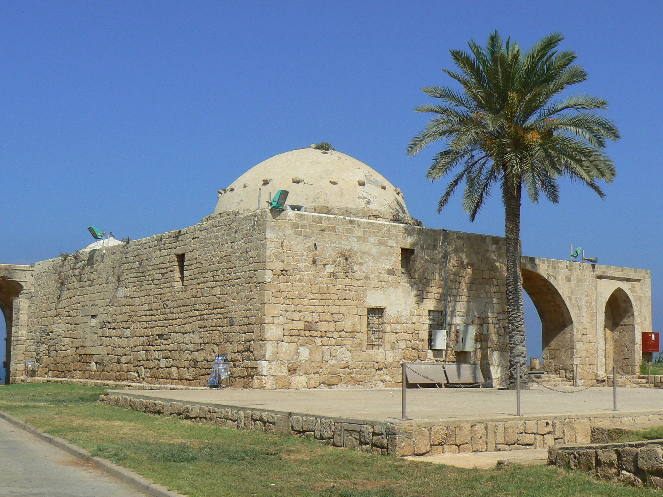 Achziv